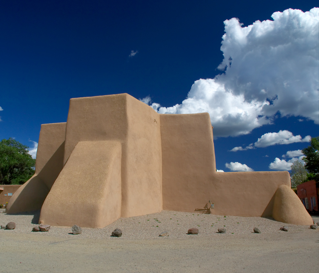 San Francisco de Asis church in Ranchos de Taos